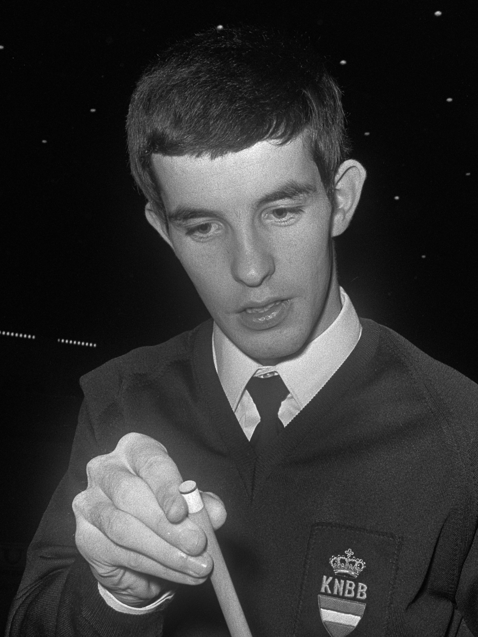 Biljarten in Amersfoort, Jean Bessems